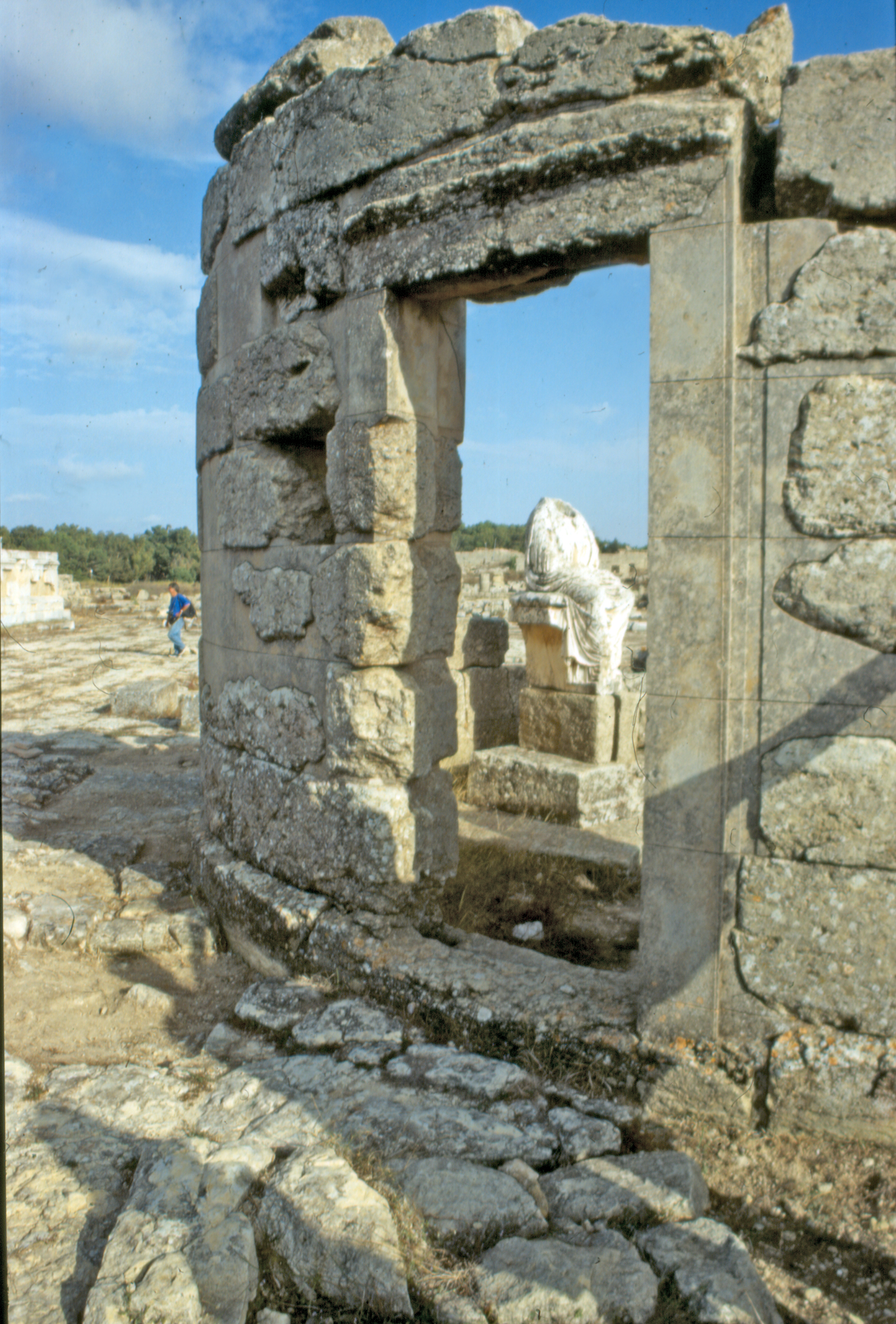 Libia, Cirene (sito archeologico), Agorà, santuario di Demetra e Kore